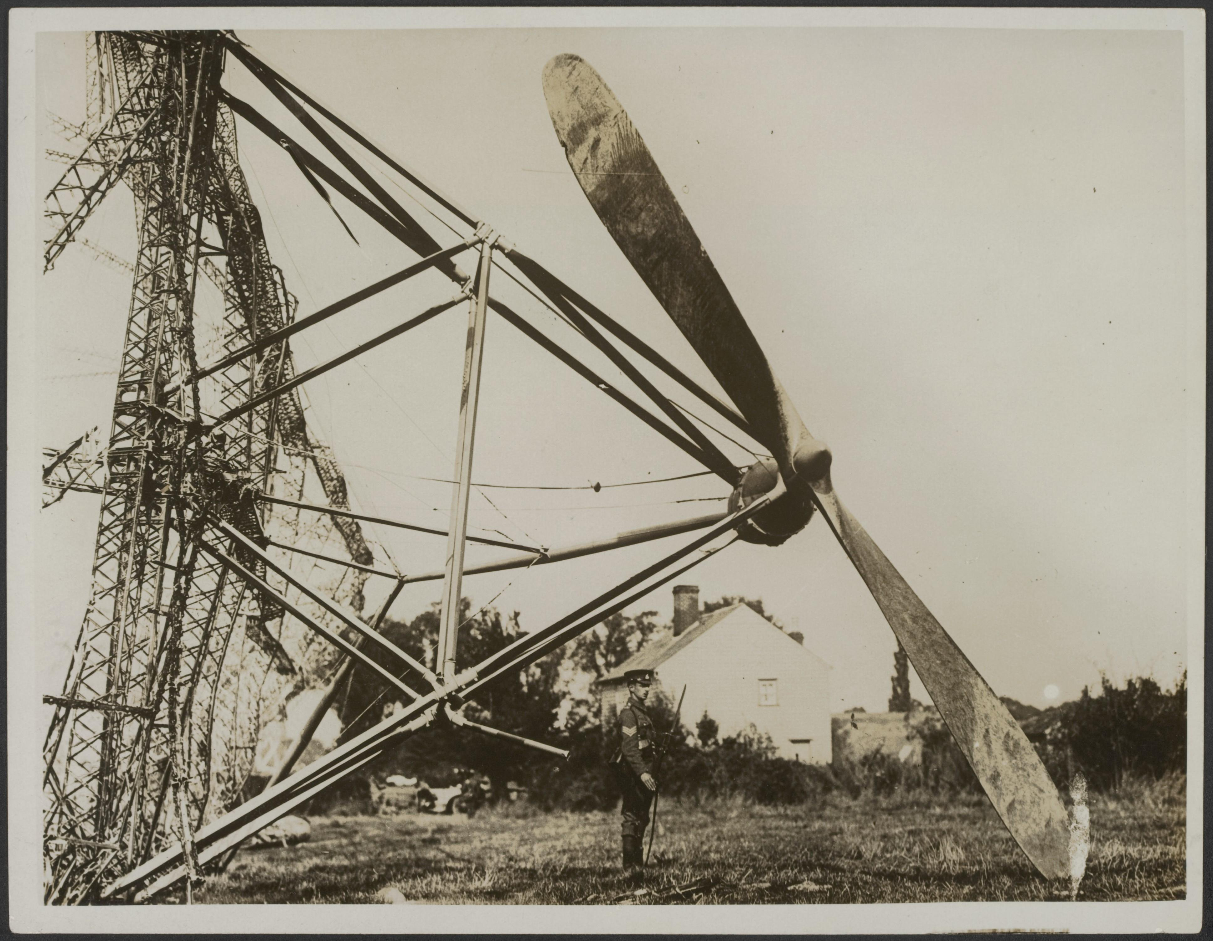 Collectie / Archief : Fotocollectie Eerste Wereldoorlog Reportage / Serie : Photograph of the 2nd Zeppelin brought down 24/9/1916 Beschrijving : One of the huge propellers Annotatie : Foto van Zeppelin neergehaald op 24 september 1916. Een van de kolossale propellers. Soldaat houdt de wacht Datum : 24 september 1916 Locatie : Groot-Brittannië Trefwoorden : eerste wereldoorlog, propellers, soldaten, wrakstukken, zeppelins Fotograaf : Central News Auteursrechthebbende : Public Domain logo Materiaalsoort : Foto (zwart/wit) Nummer archiefinventaris : bekijk toegang 2.24.09 Bestanddeelnummer : 158-2592